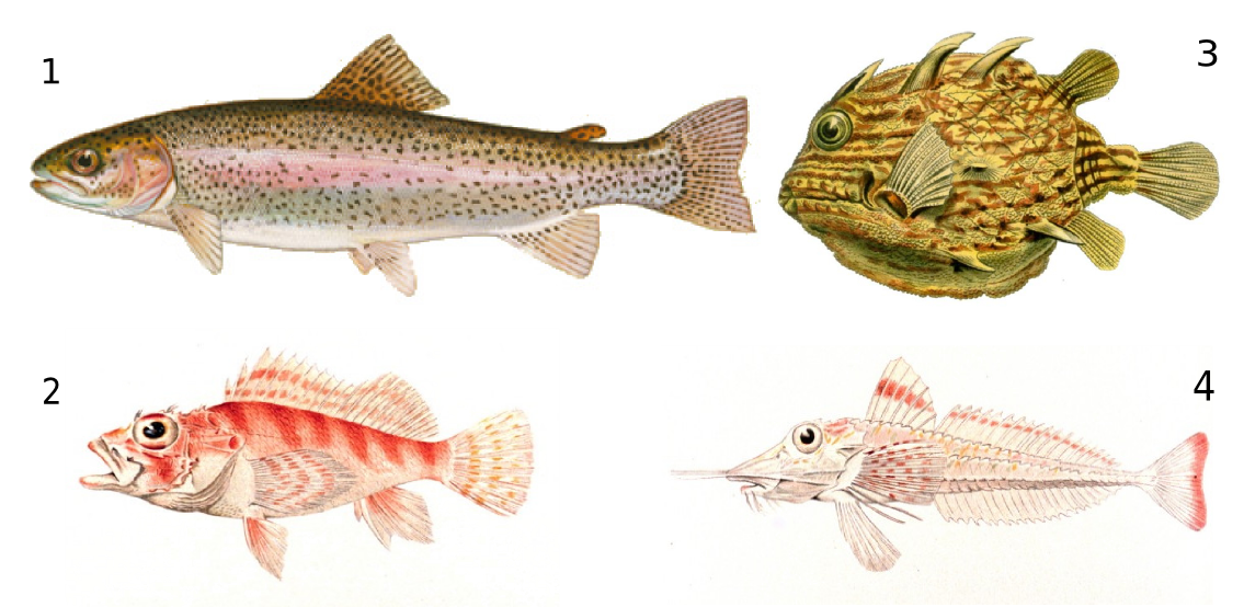 Przykłady ryb kostnoszkieletowych Fish 1 = Oncorhynchus mykiss Fish 2 = Pontinus nematophthalmus Fish 3 = Aracana aurita Fish 4 = Peristedion gracile